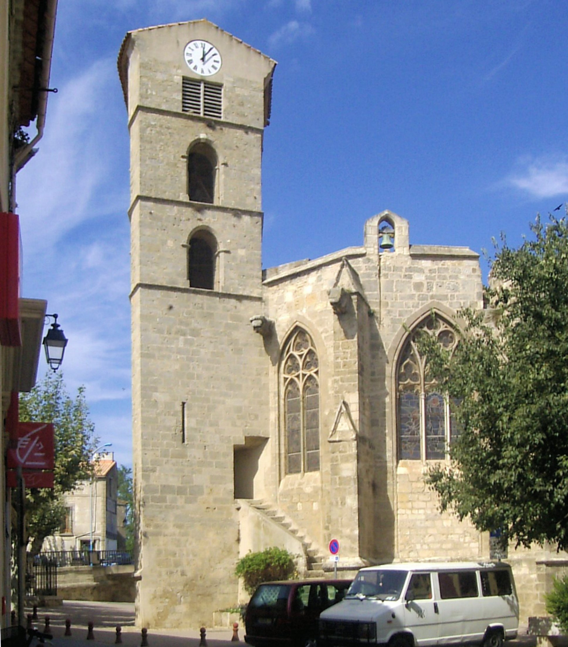 L'église Notre-Dame à Coursan